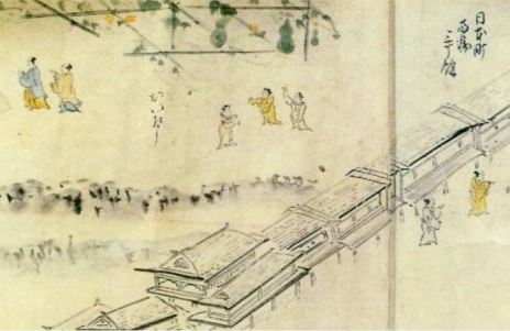 Phố Nhật ở Hội An đầu thế kỷ 17